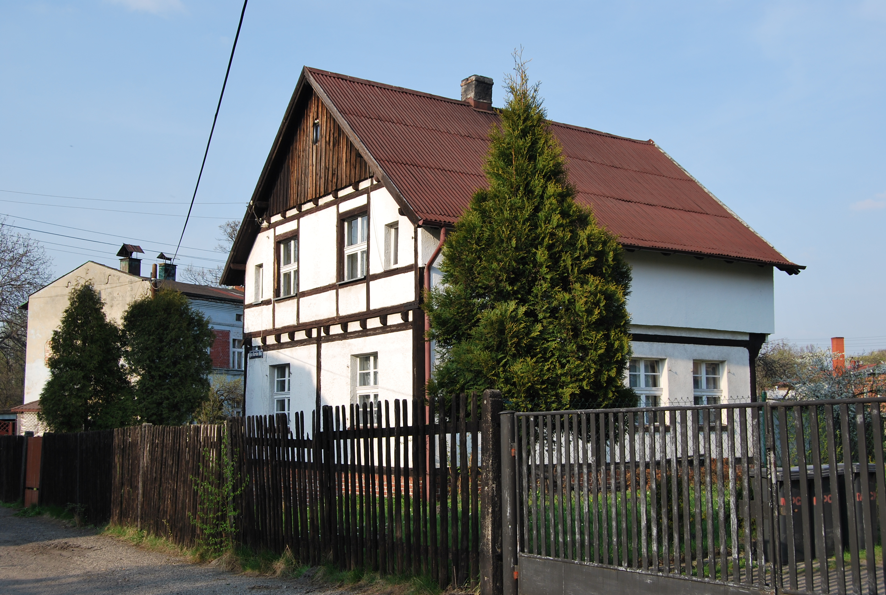 Budynek szachulcowy z przełomu XIX/XX wieku w Katowicach Ligocie.